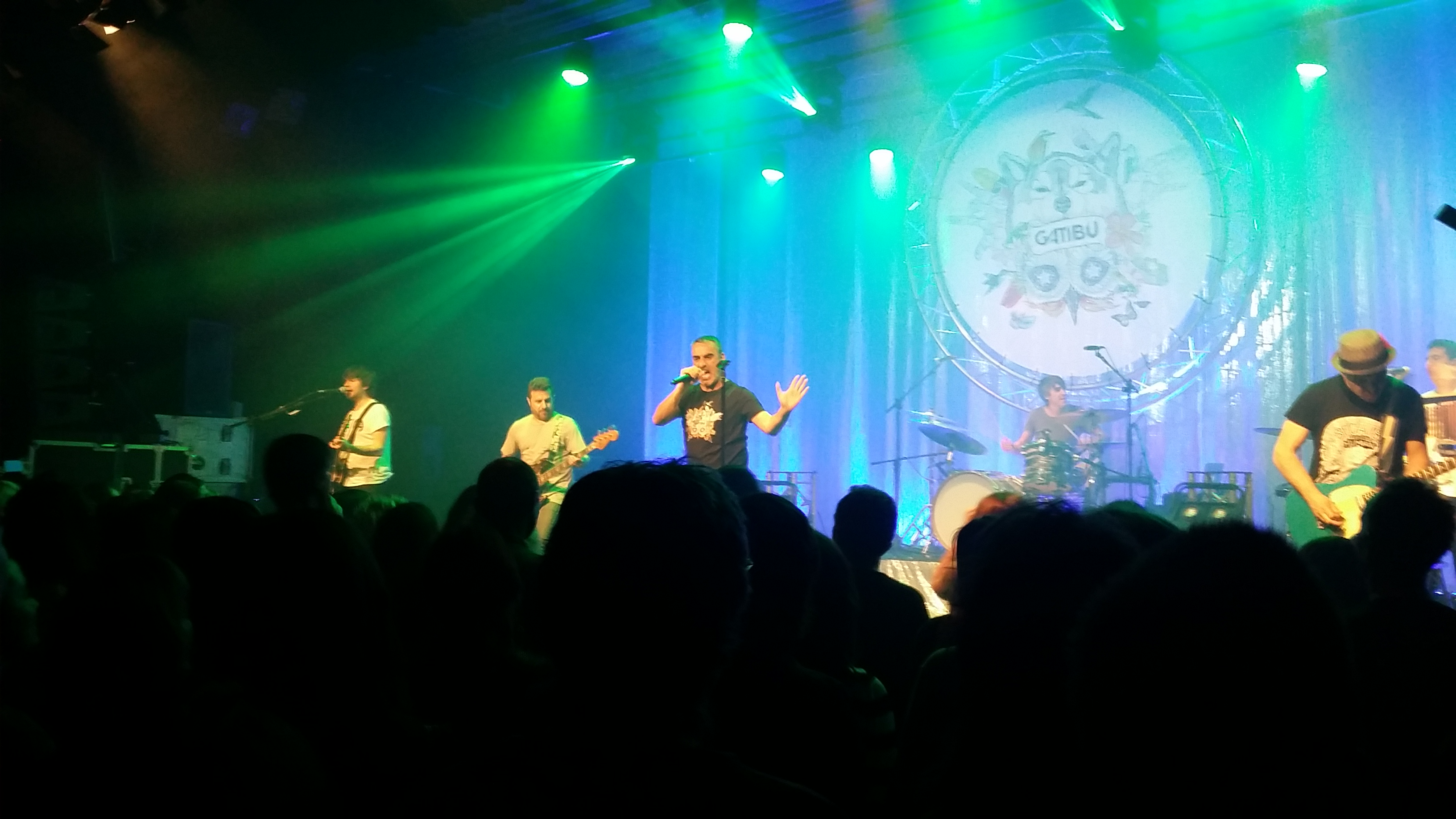 Gatibu, Intxaurrondo Kultur Etxean 2017